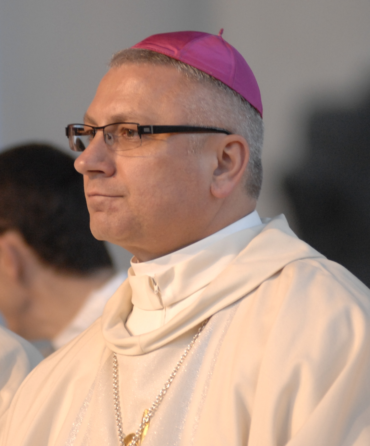 Artur Miziński - Biskup pomocniczy lubelski i Sekretarz generalny Konferencji Episkopatu Polski